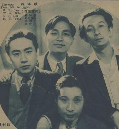 电通 1935-1 电通公司四位导演 孙师毅 司徒慧敏 许幸之 袁牧之